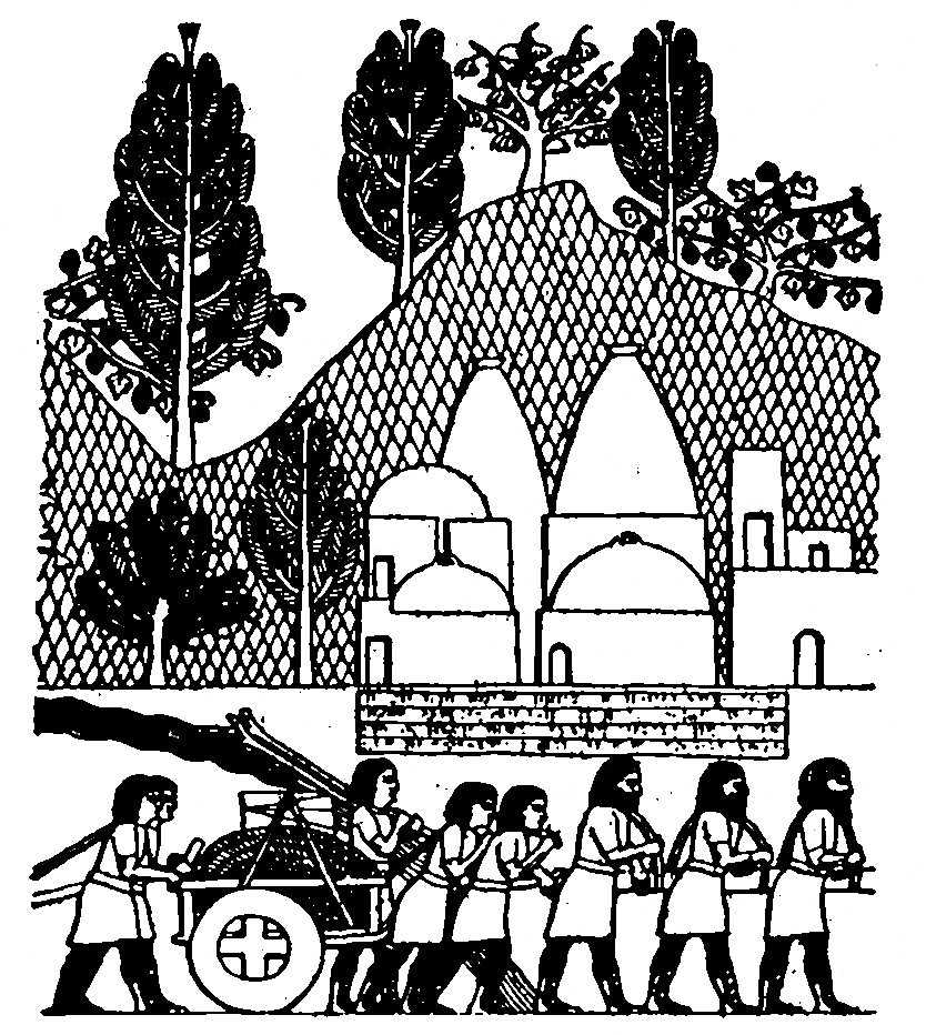 Vault fig 01 - Bas relief from Nimrud